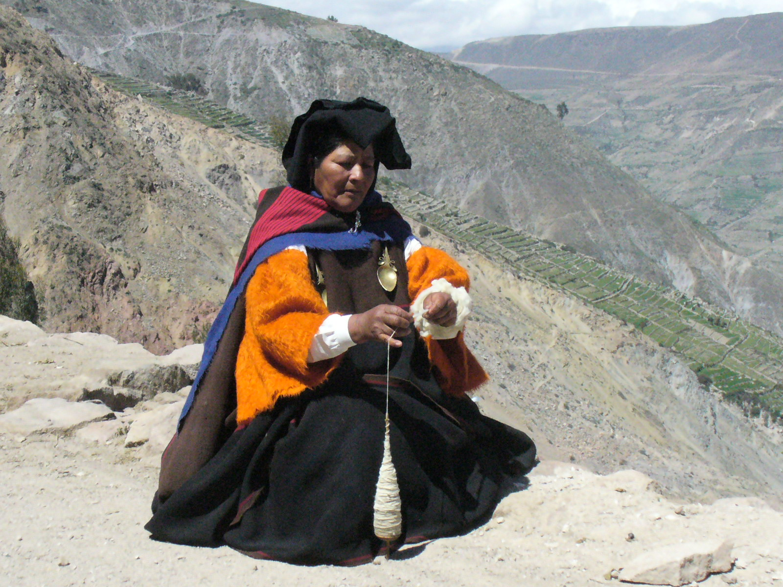 Anaco: "urku" negro, es una vestimenta femenina originaria del distrito de Camilaca. Vestimenta camilaqueña declarada Patrimonio Cultural Inmaterial del Perú, declarado por el Instituto Nacional de Cultura y el Ministerio de Cultura del Perú en el 2009.